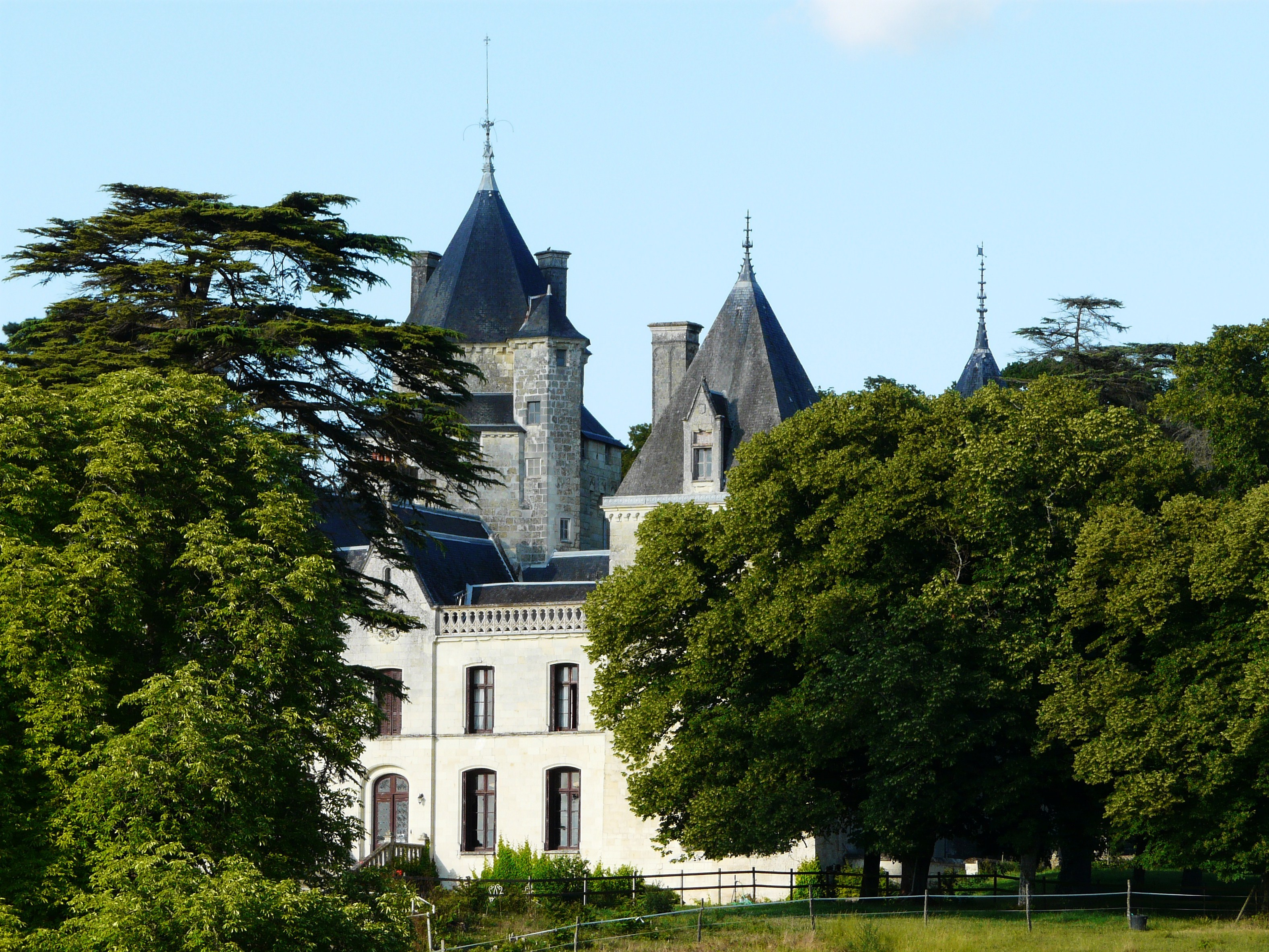 Le château de Ternay, Vienne, France